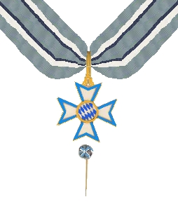 Eigen tekening Robert Prummel 12 dec 2006 16:46 (CET)